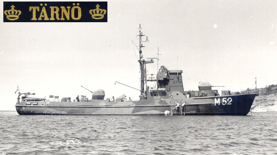 M52 Tärnö på livräddningsövning på svenska västkusten 1975.